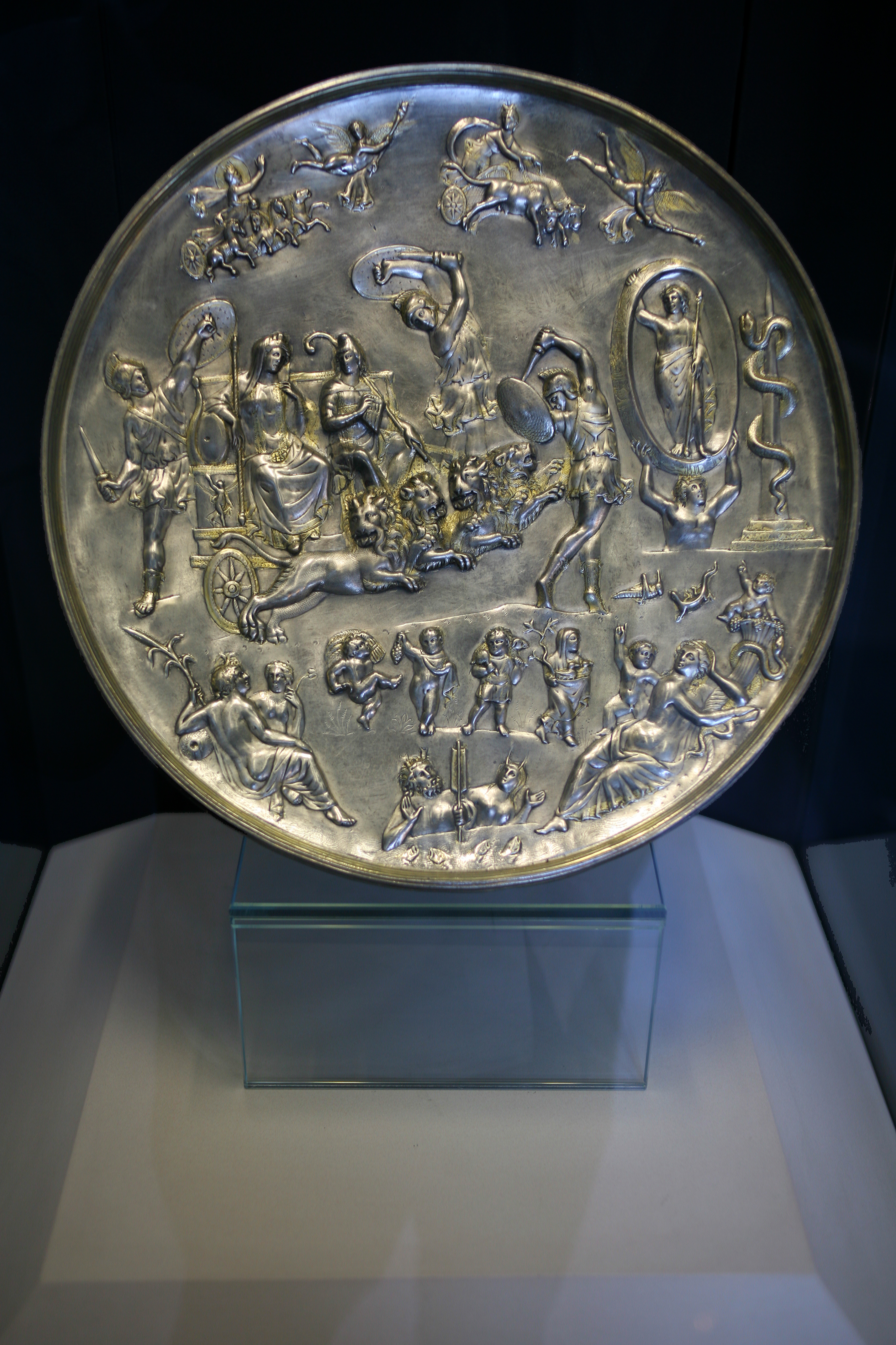 La cosiddetta Patera di Parabiago, conservata al Museo archeologico di Milano